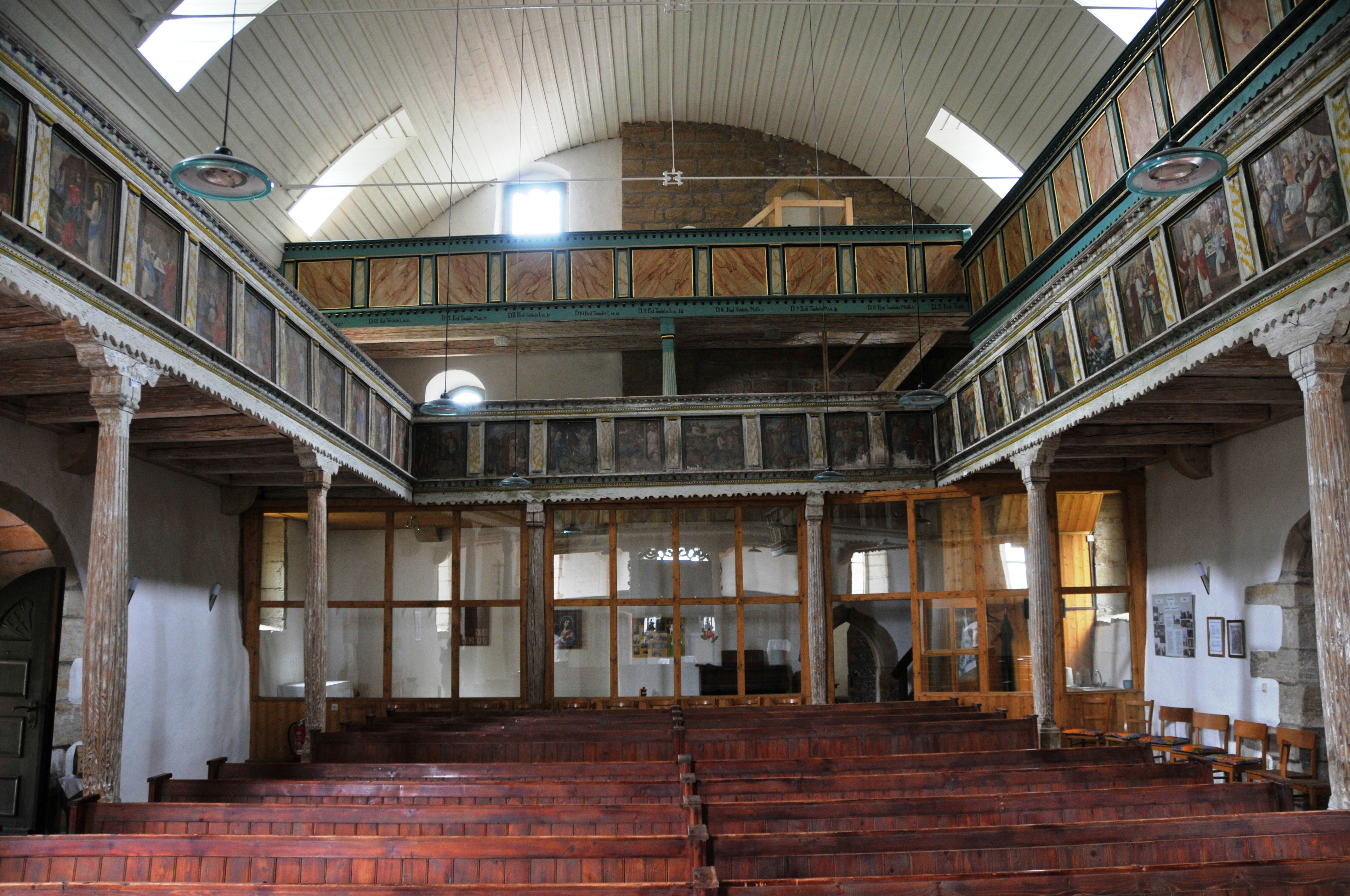 Ermstedt, Kirche, Kircheninneres